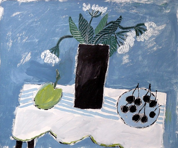 Acryl auf Karton, 42 x 51 cm